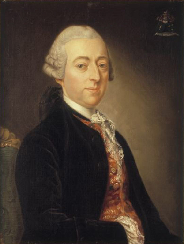 Baron Robert Frans Coppieters (1727-1797), burgemeester van Brugge.